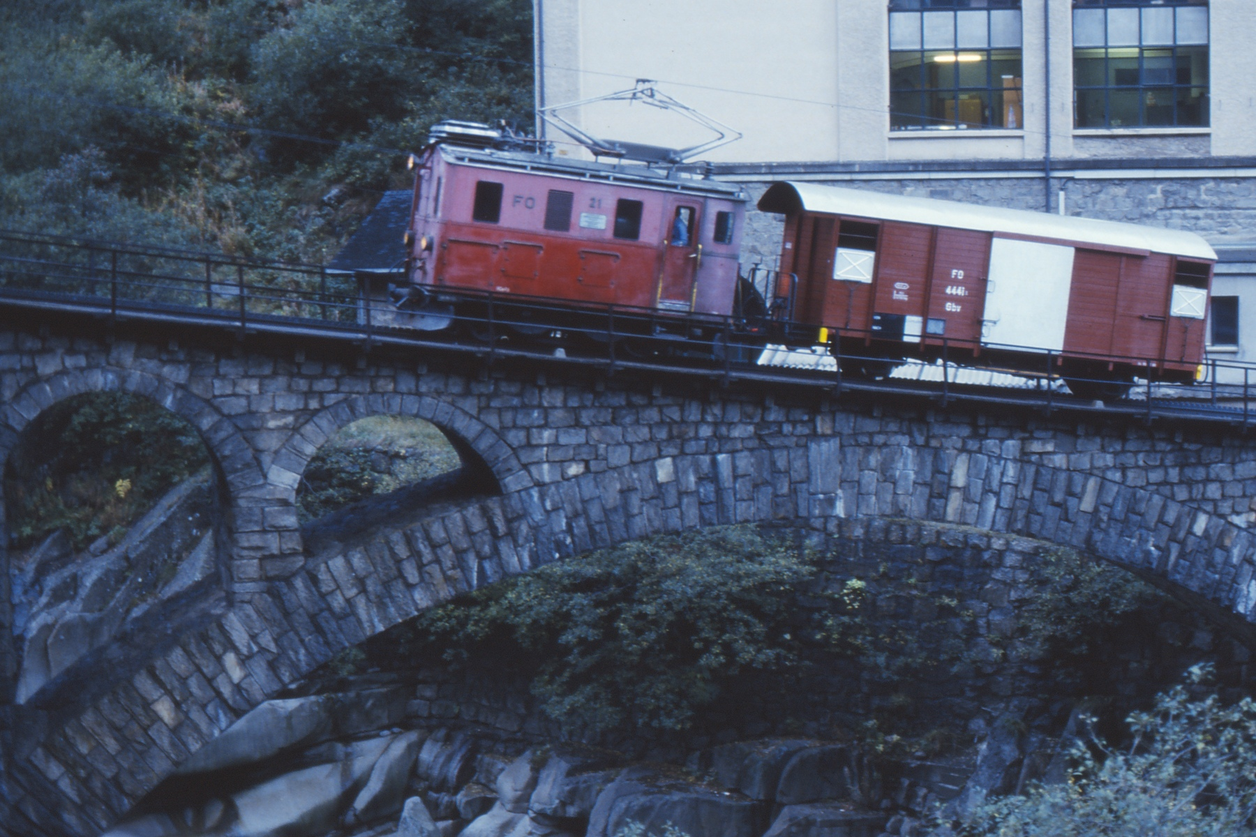 HGe 2/4 Schöllenenschlucht Einfahrt von Göschenen